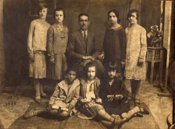 Shadije Alizoti Beli klasa e VI (viti 1928)